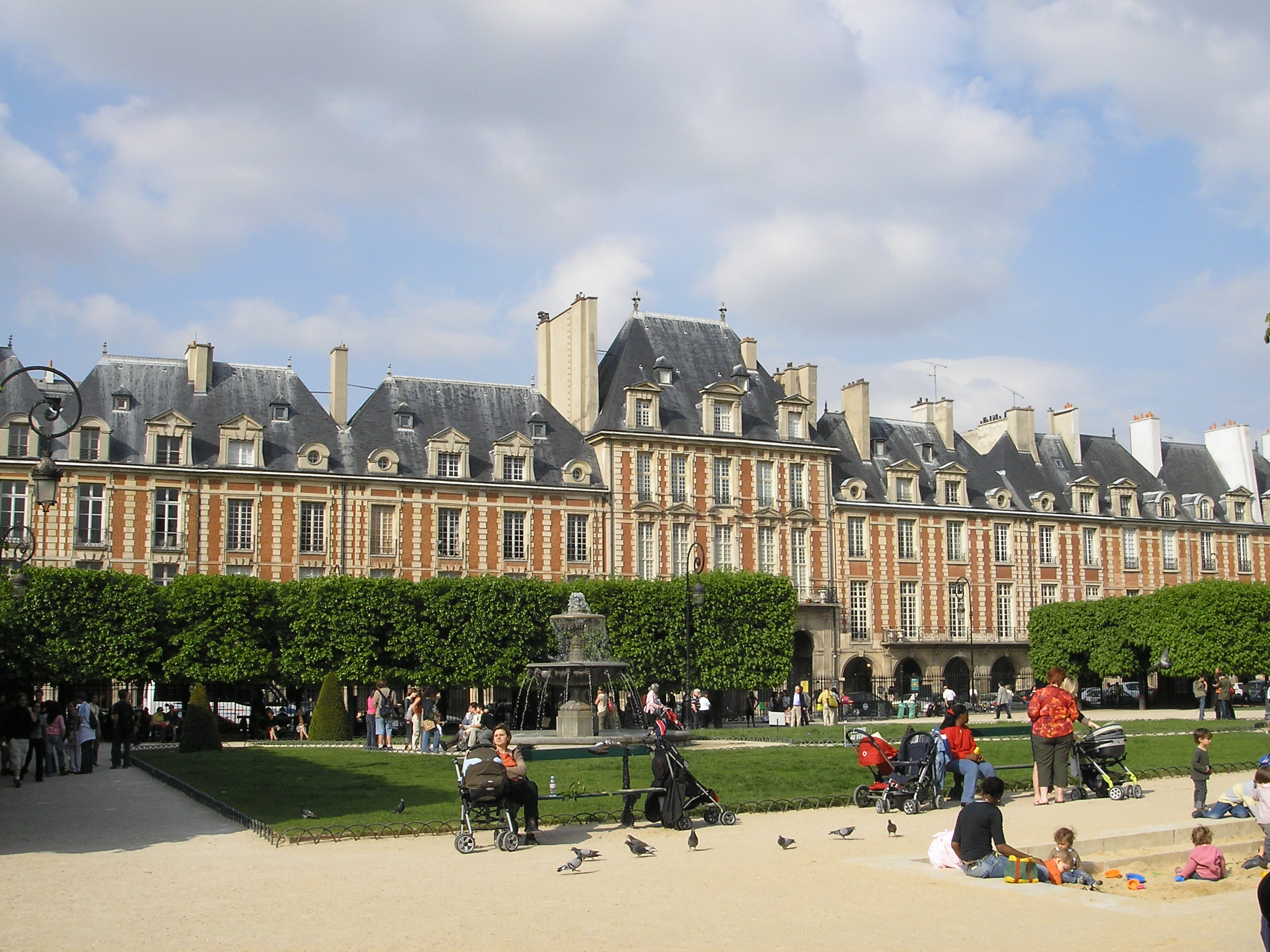 Place des Vosges in Paris, the Pavillion de la Reine.